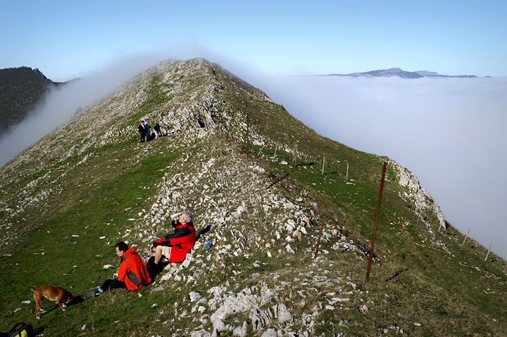 txurregi X